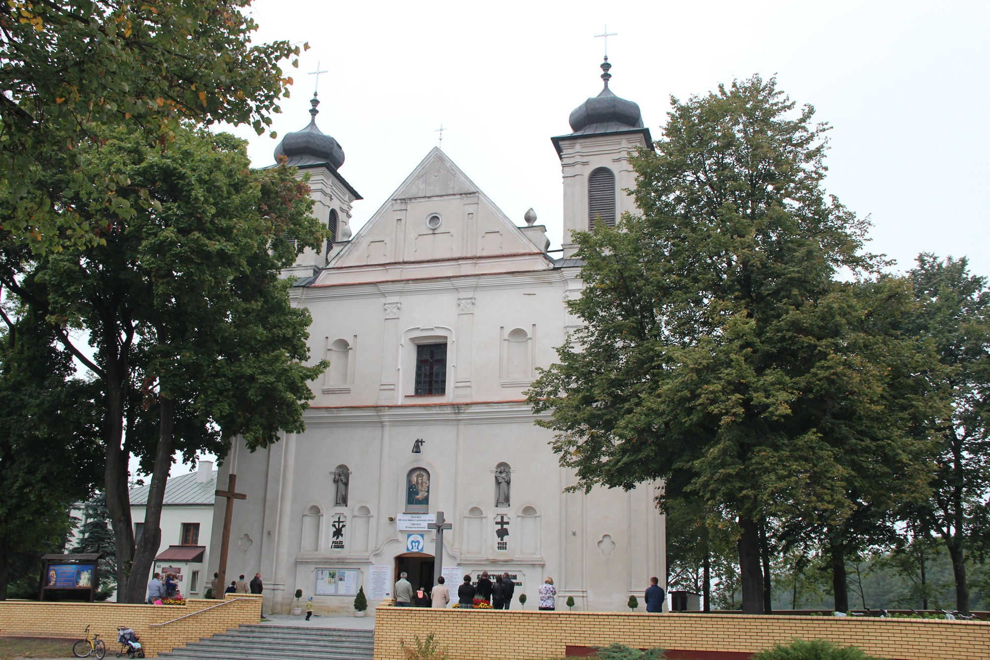 Orchówek, kościół klasztorny augustianów, ob. par. p.w. św. Jana Jałmużnika, 1770-1780